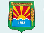 Герб г. Григориополь